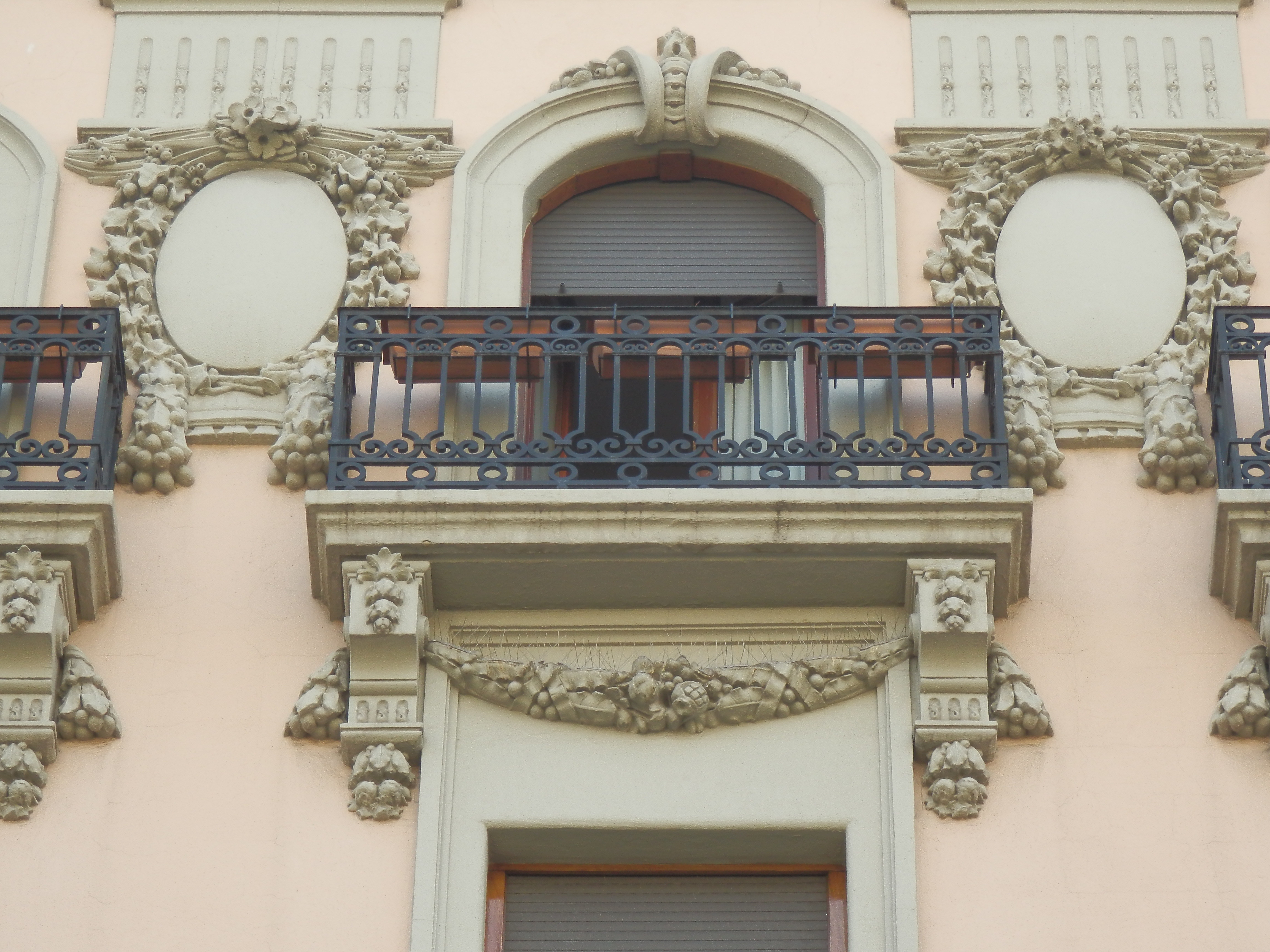 Edificio de viviendas en el Paseo de Sagasta, 37, de Zaragoza, España. Es bien de interés cultural (BIC) de la provincia de Zaragoza.